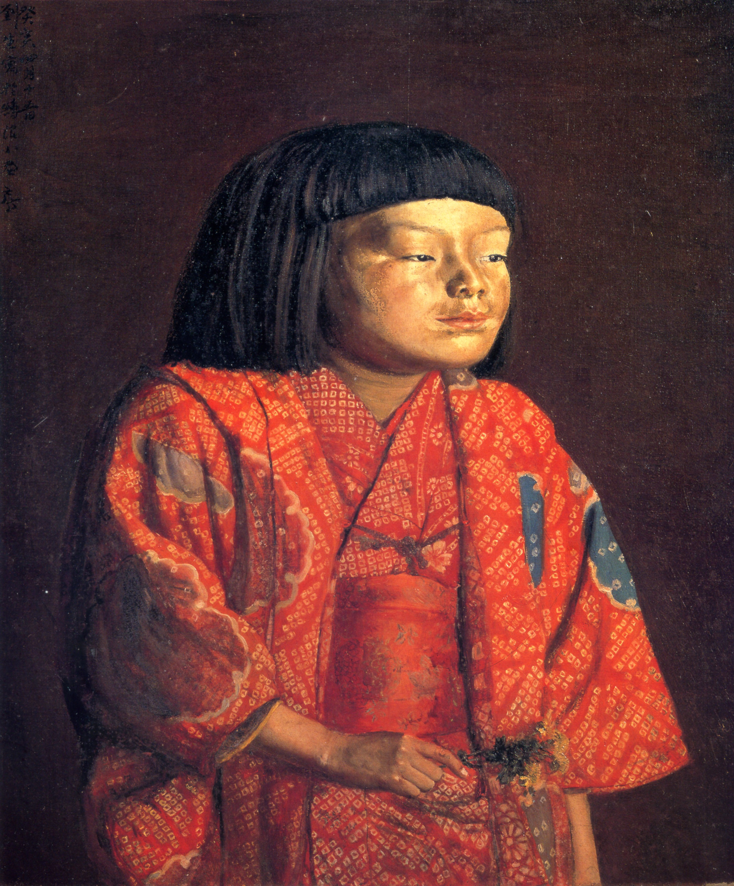 Young Girl (Reiko Standing) (童女図/麗子立像)